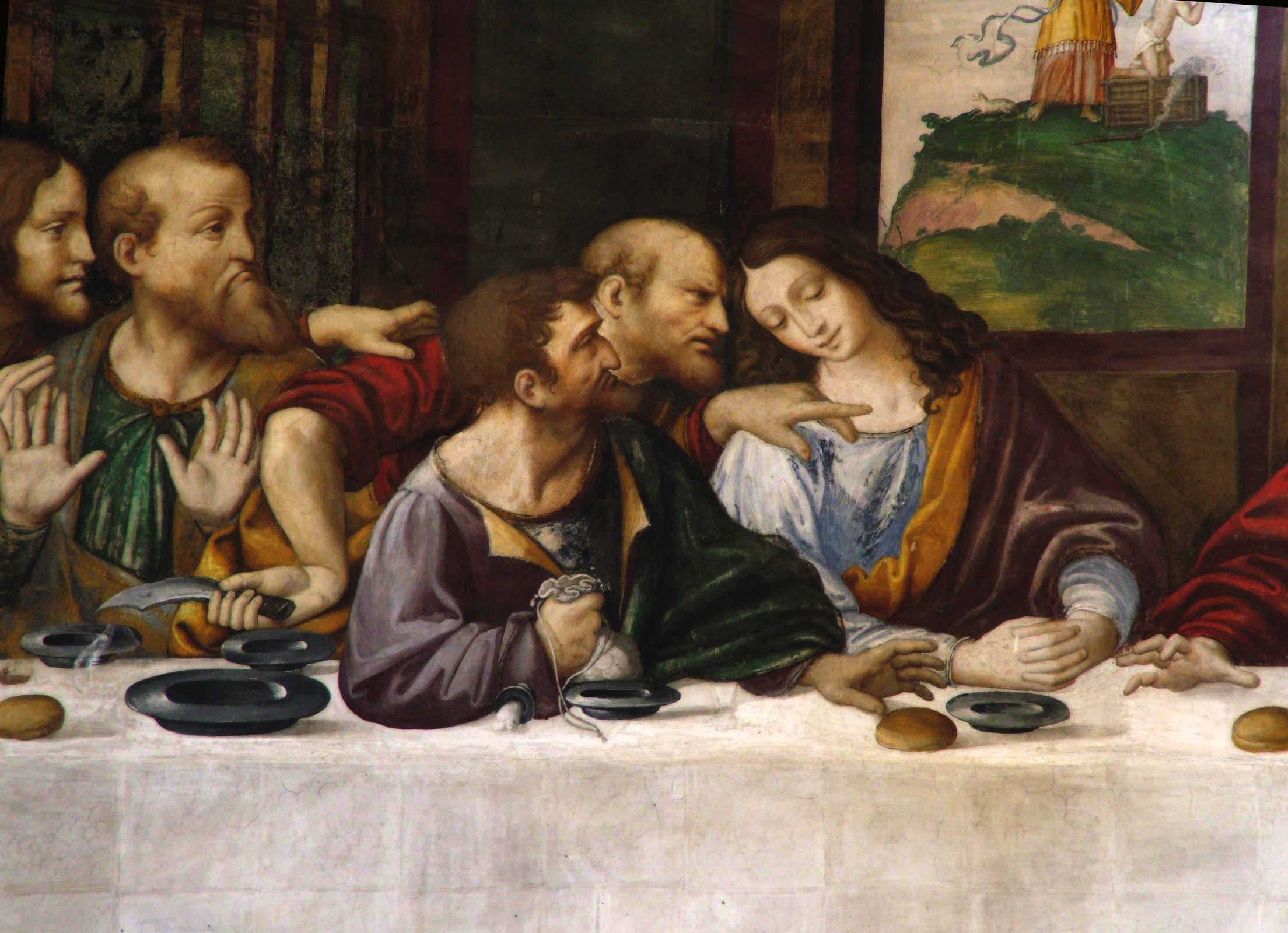 Ponte Capriasca - Chiesa di S. Ambrogio Ultima cena di Cesare da Sesto (allievo di Leonardo da Vinci) Dettaglio